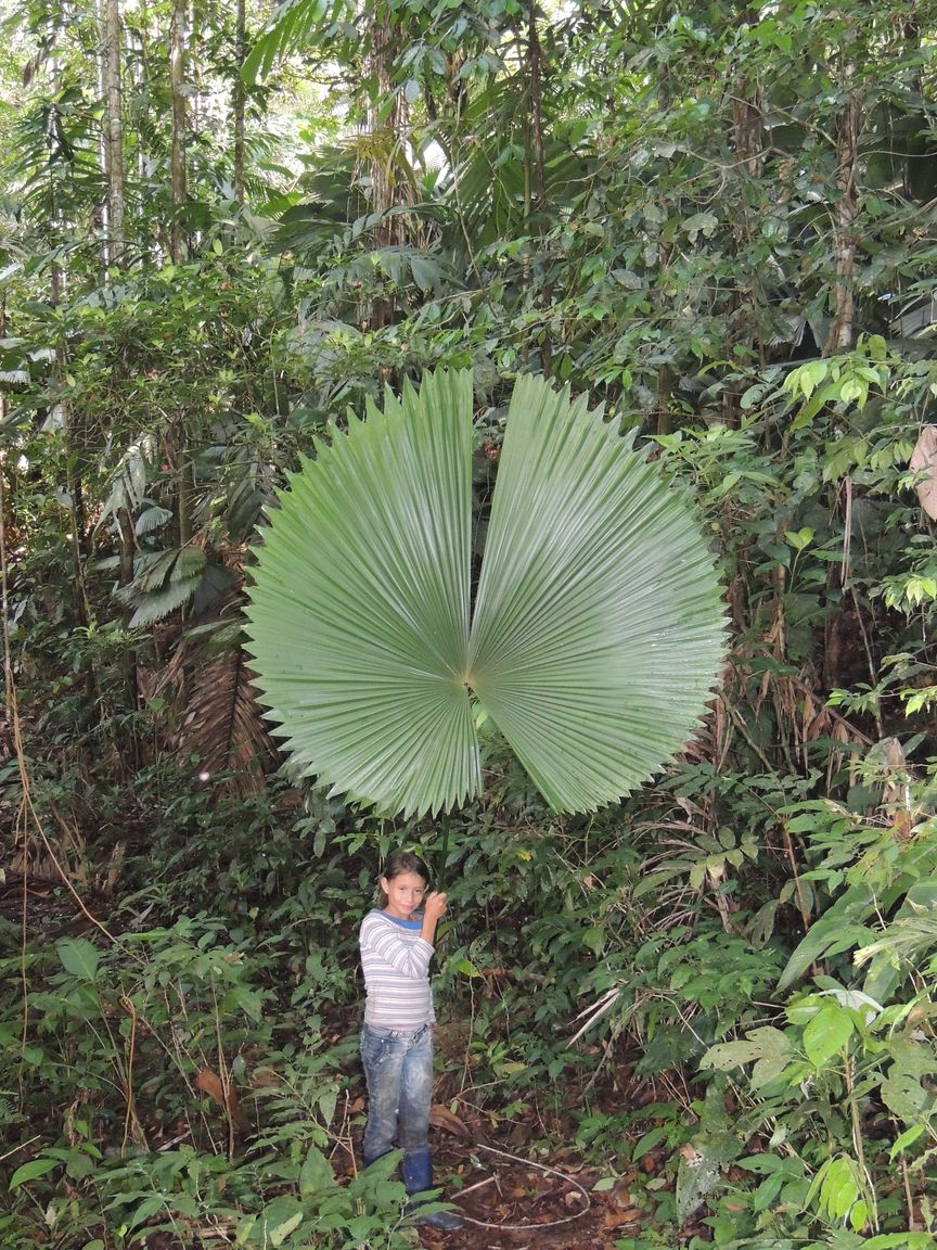 Hoja de Sabinaria magnifica sostenida por Angie Henao